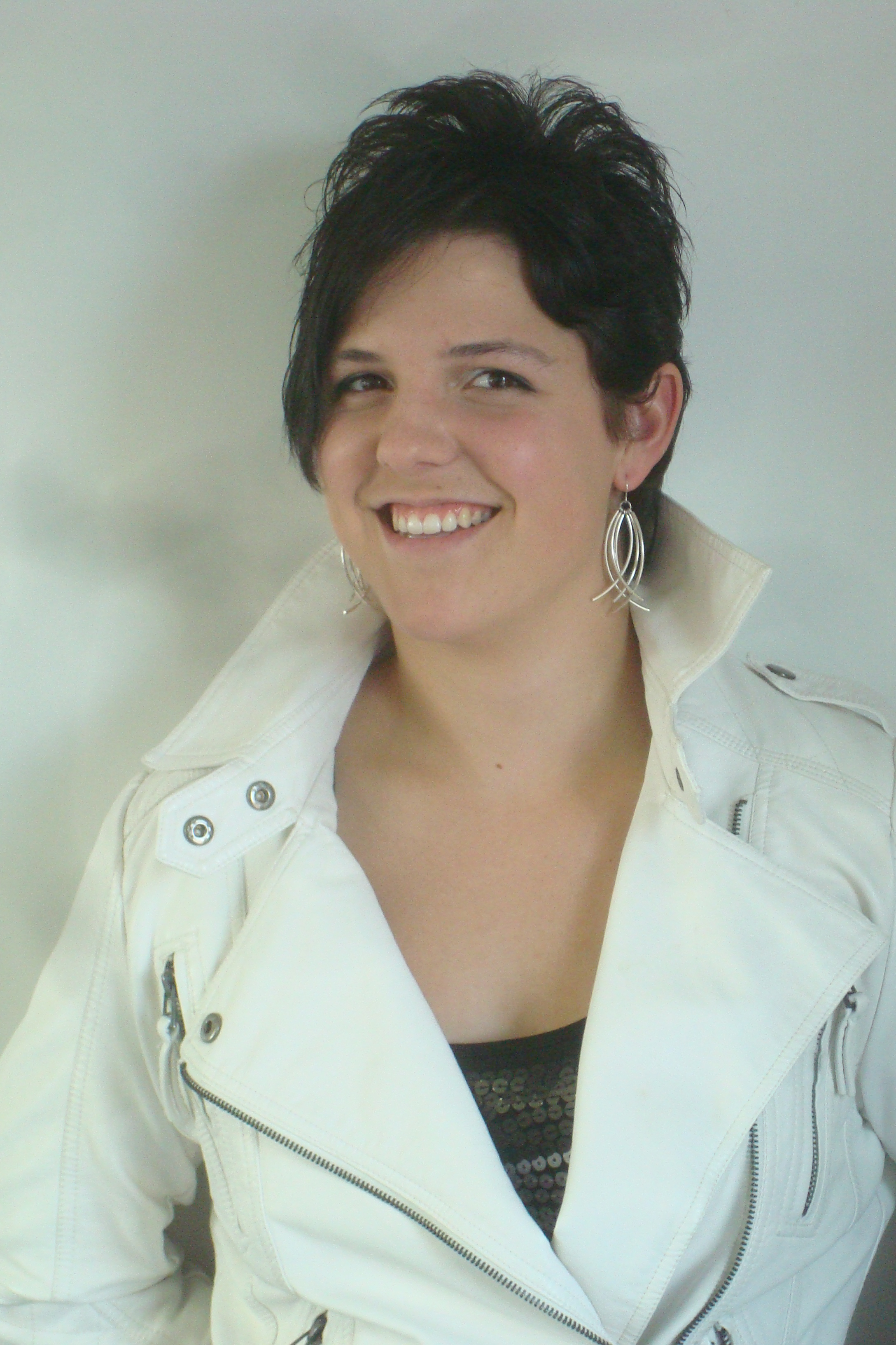 Portrait